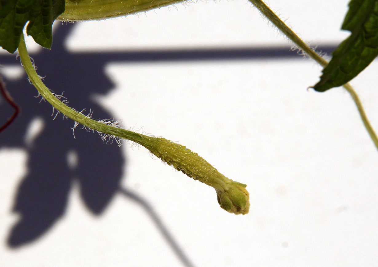 Margose : Fleur femelle avec fruit (cultivar à fruit blanc)